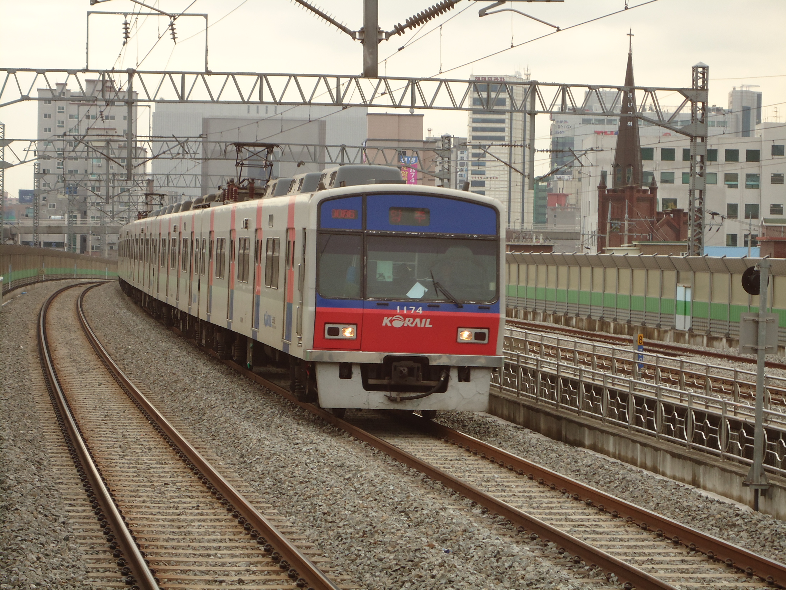 한국철도공사 3세대 저항전동차